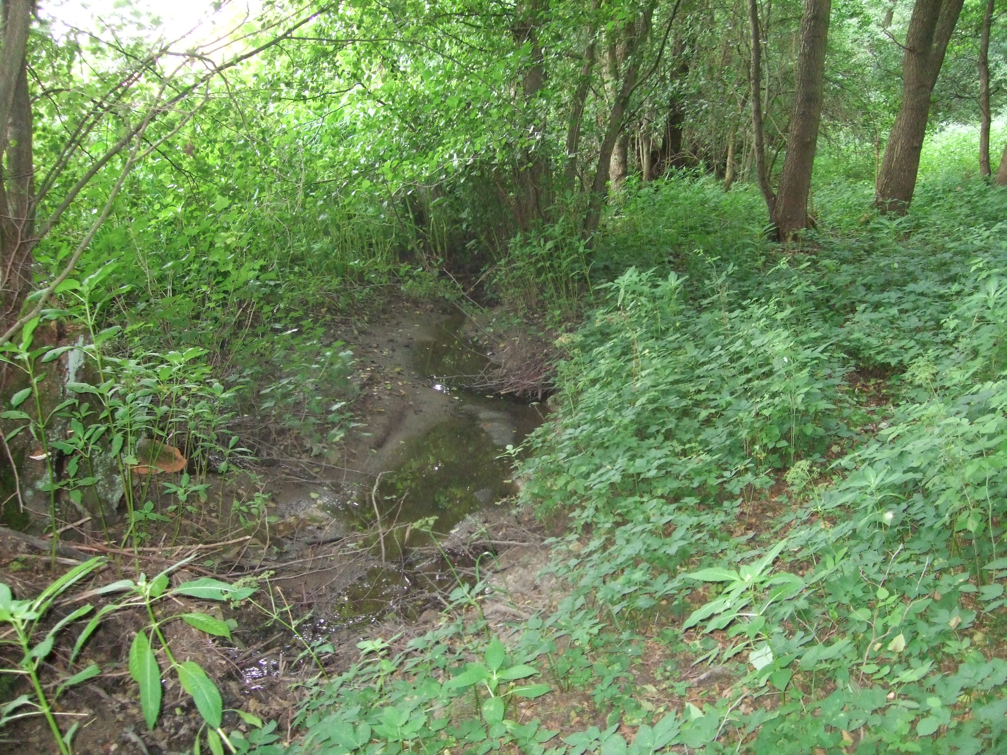 Der Röllbach bei Usingen